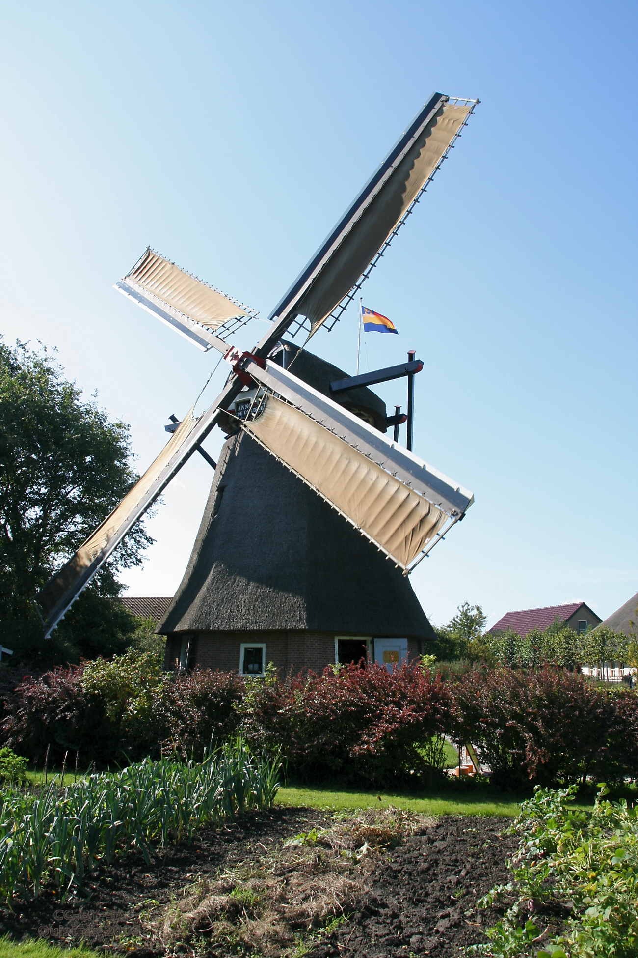 Hippolytushoef: molen De Onderneming met zeilen